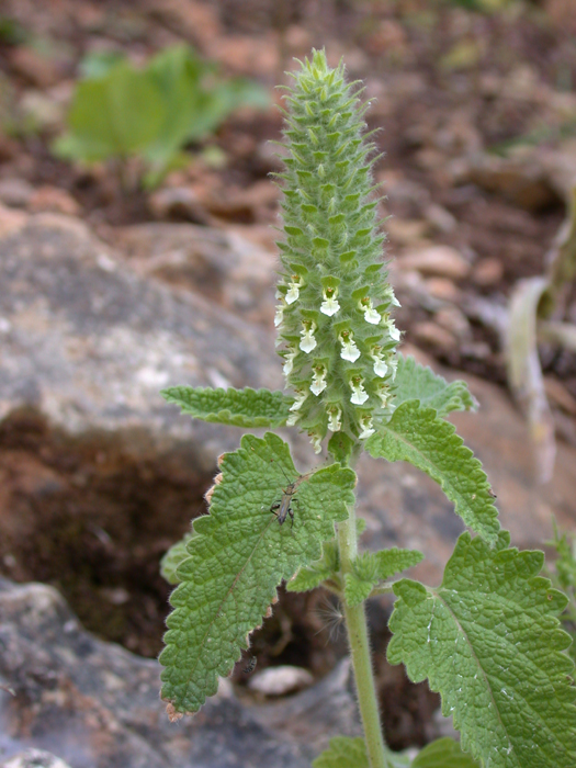 Teucrium lamiifolium D'Urv. (געדת החורש), Nachal Kziv, Upper Galilee, Israel, May 16, 2006.